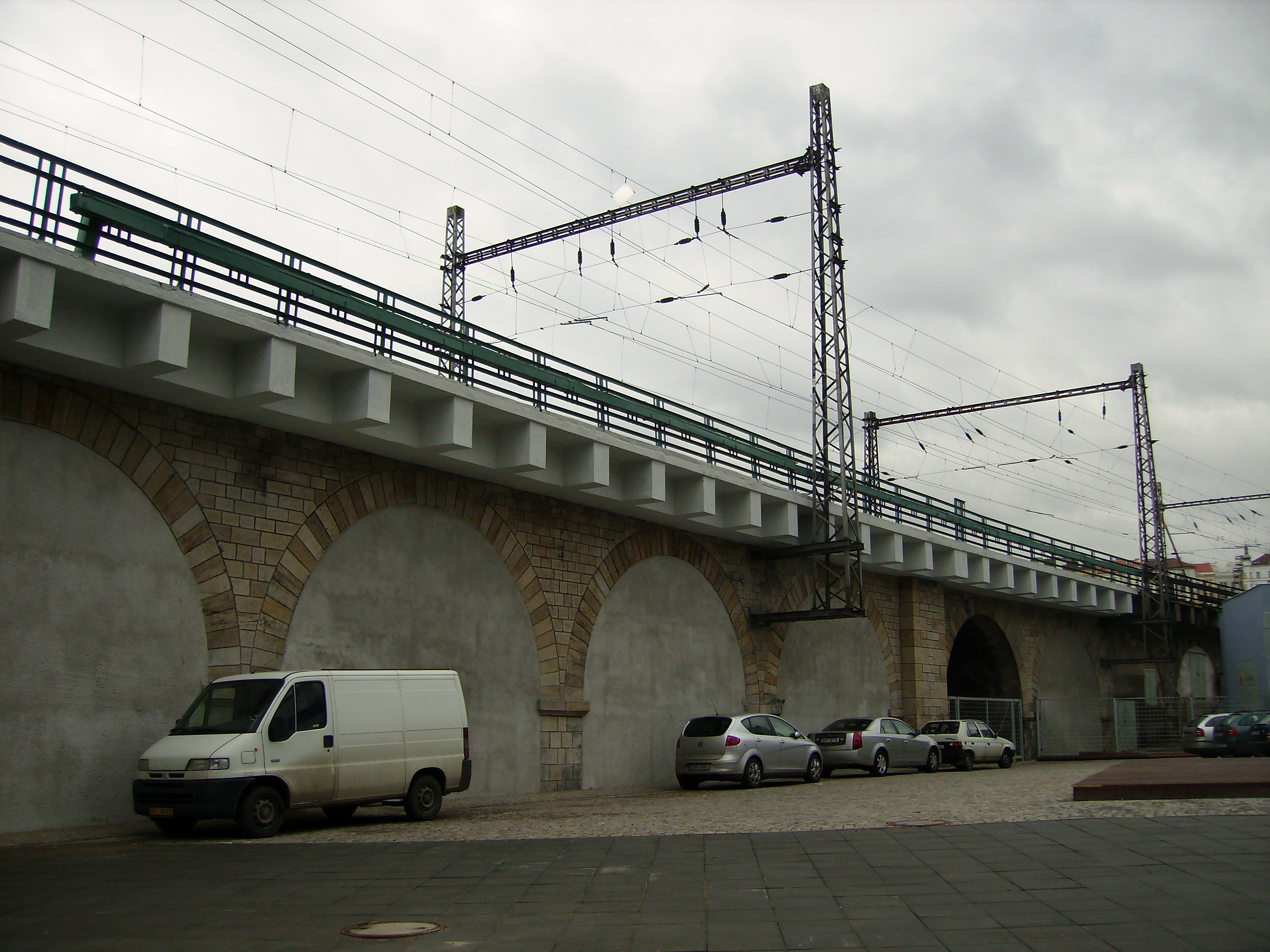 Negrelliho viadukt u Hudebního divadla.